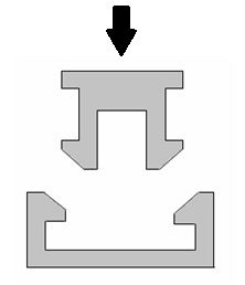 esquema del ensamblaje mediante presillas